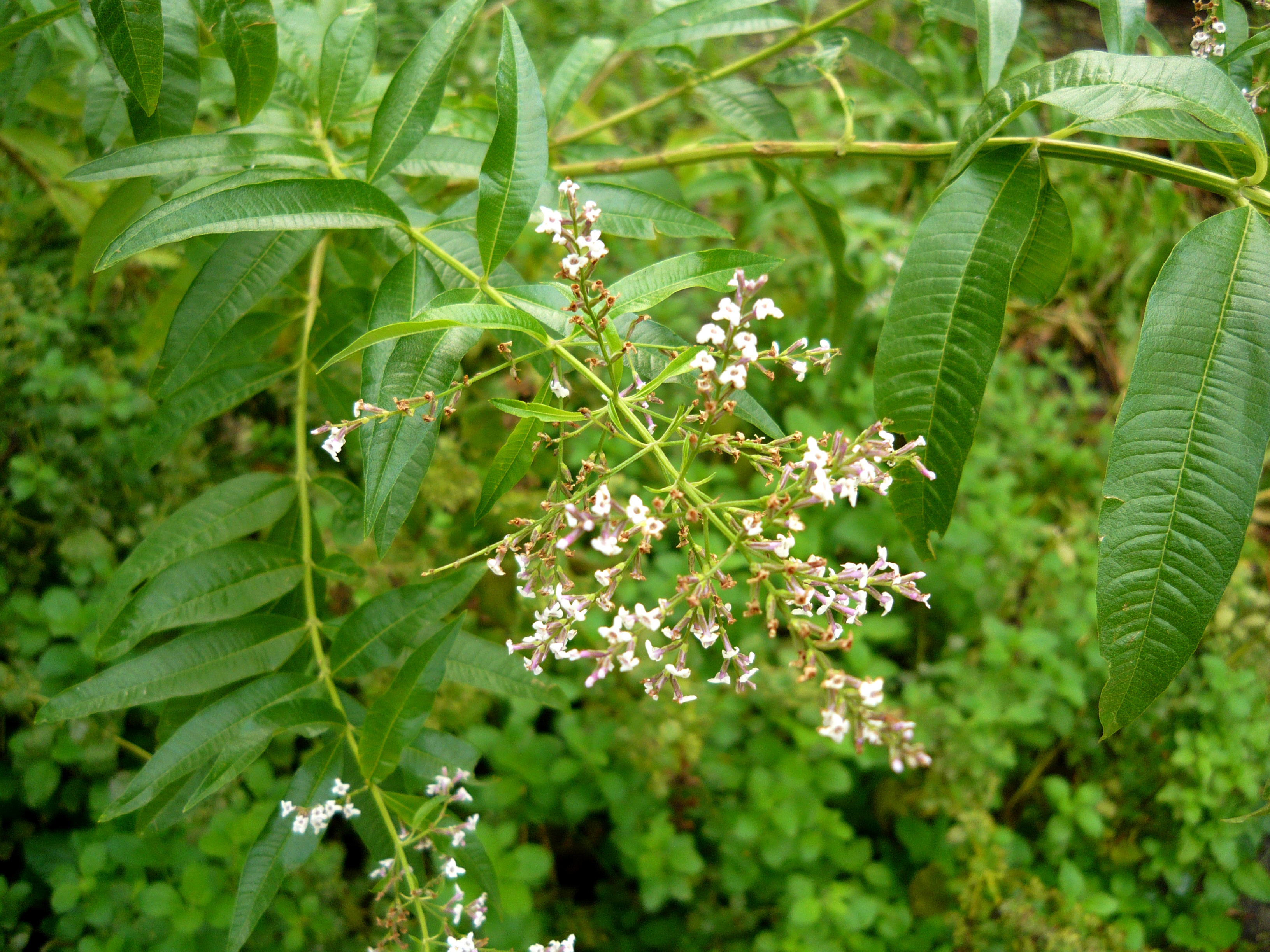 Aloysia citrodora, yerbaluisa. Real Jardín Botánico de Madrid.